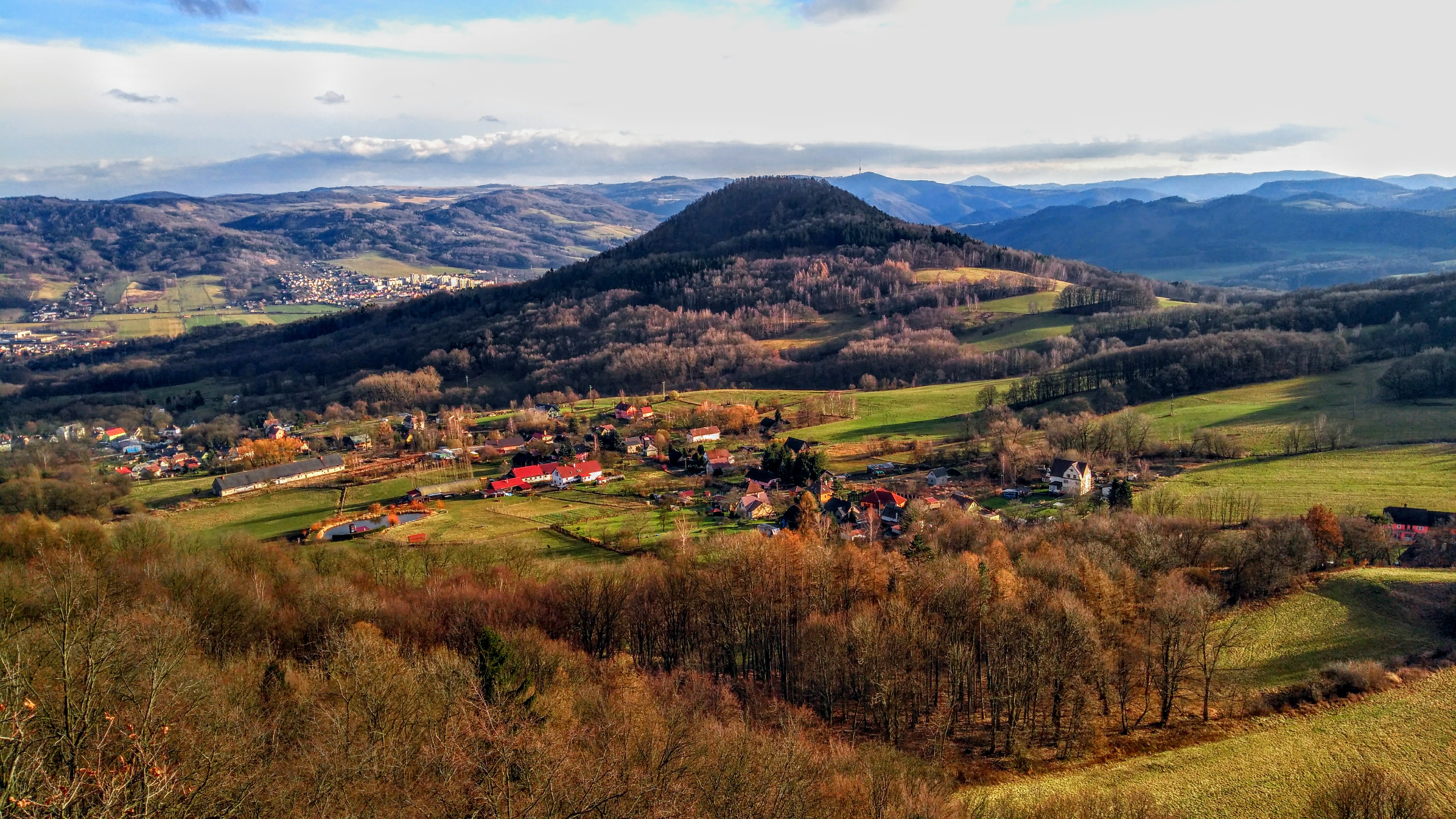 Obec a vrch.